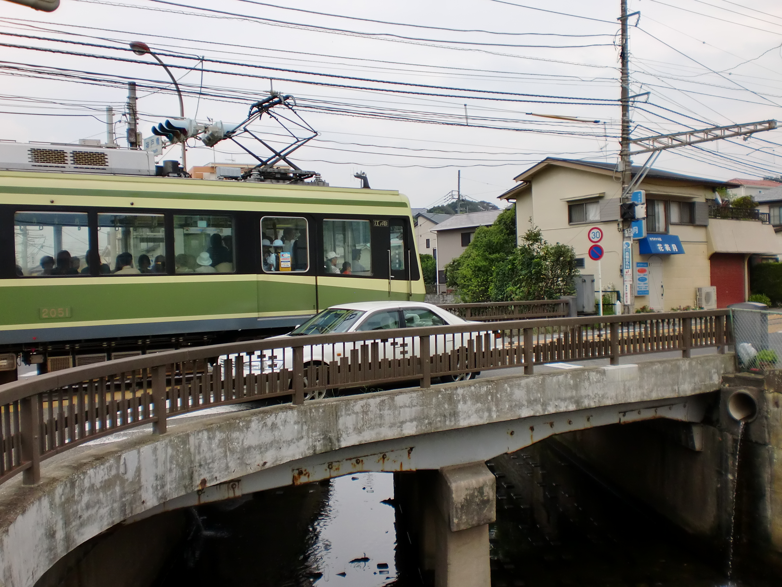 江ノ島電鉄の神戸橋。鉄道と道路の走行域が共用となっている鉄道道路併用橋としては日本で唯一残っている。